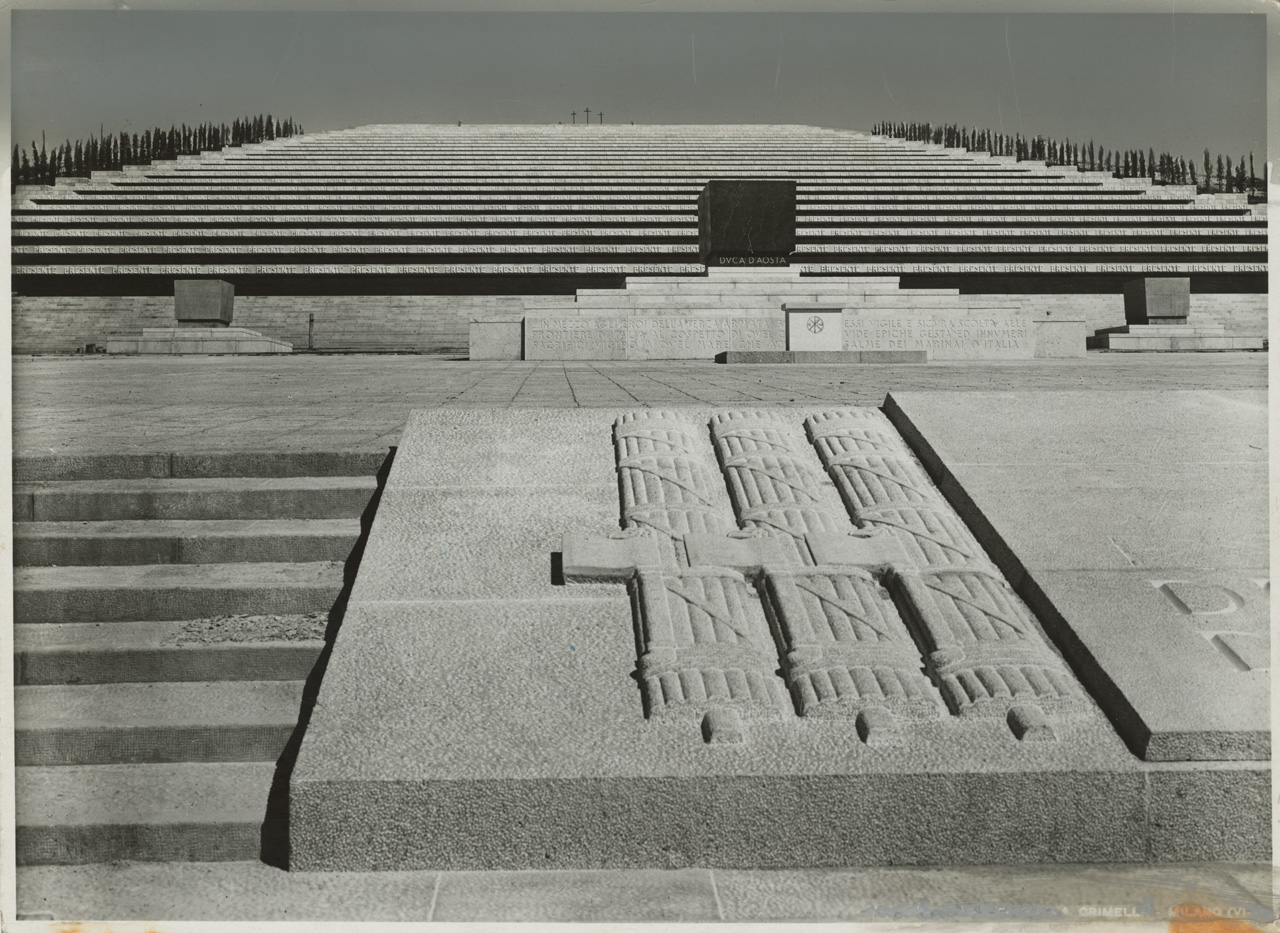 Sacrario di Redipuglia veduta generale